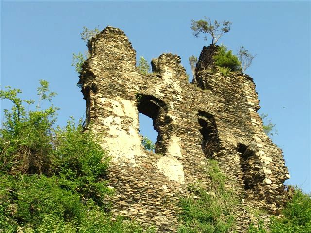 Ruine Burg Isenburg, Haupthaus